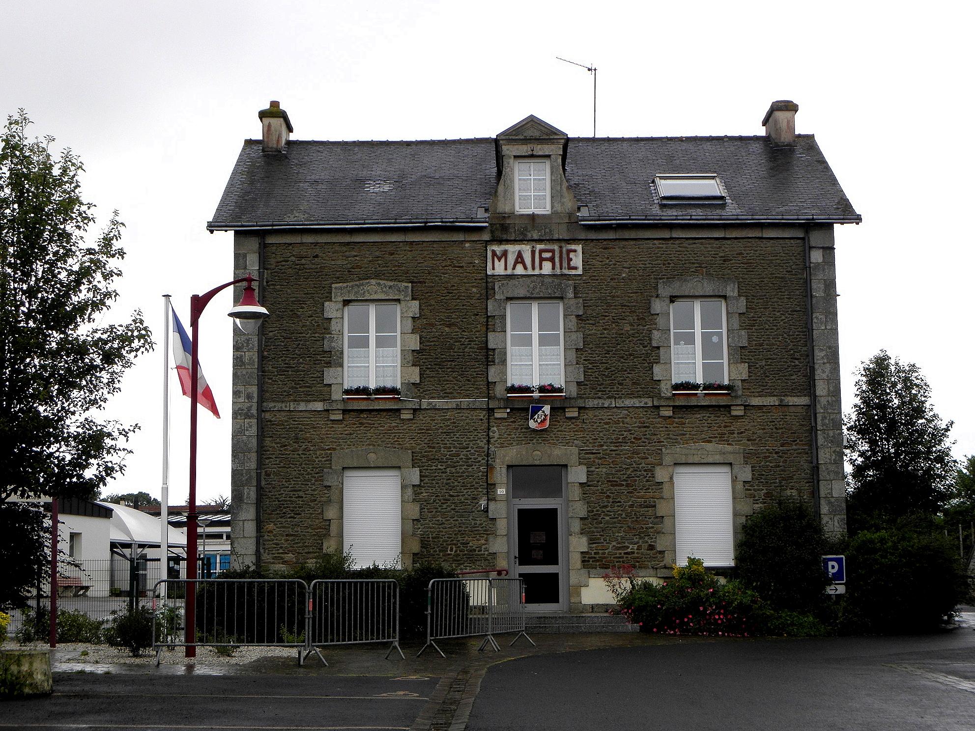 Mairie de Saint-Denis-sur-Sarthon (61).